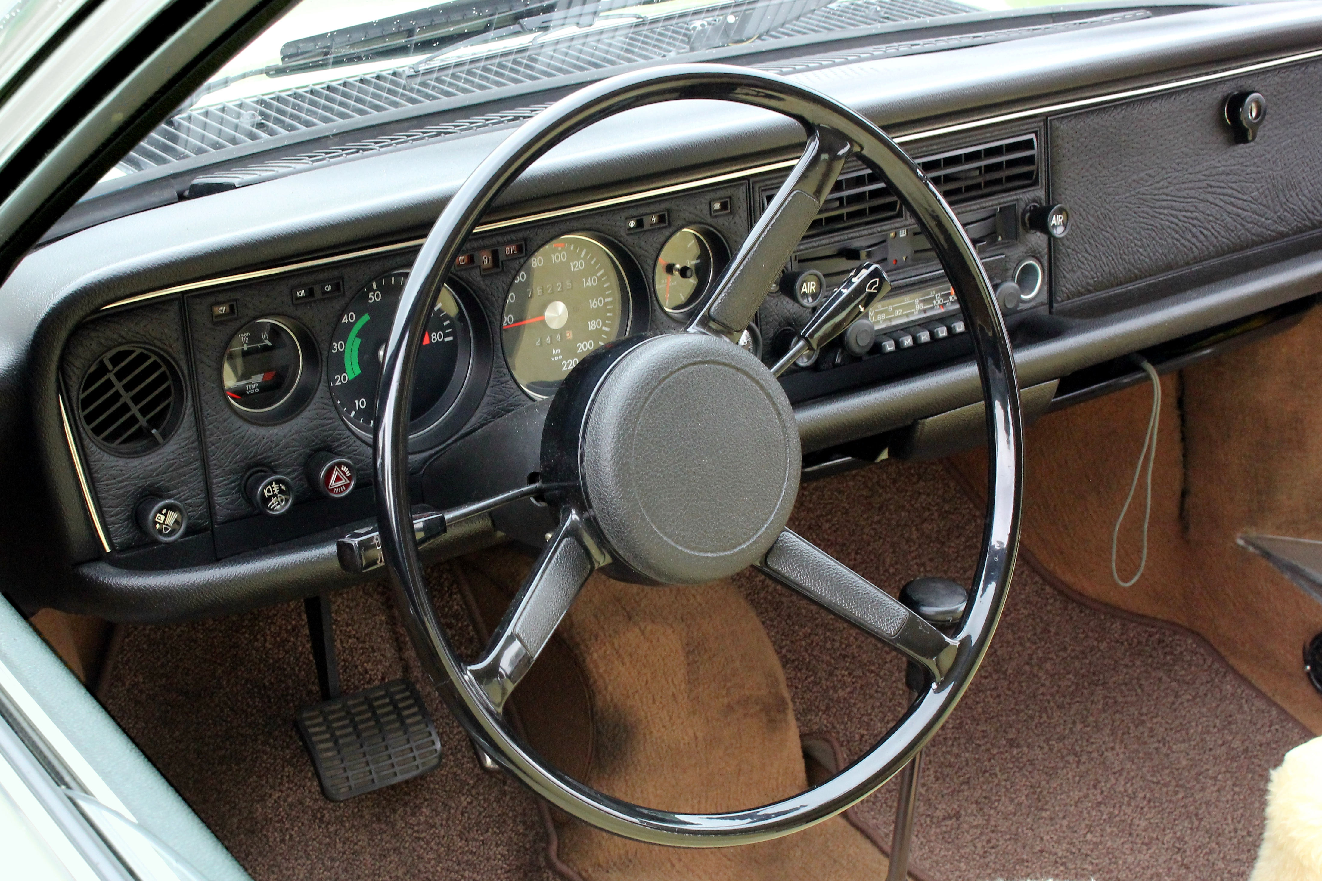 Armaturenbrett und Lenkrad eines NSU Ro 80, Baujahr 1976